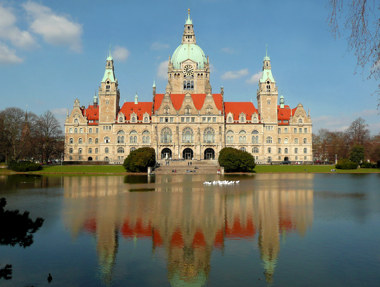 Maschteich und Neues Rathaus Hannover, Gartenfassade mit vorgelagerter Freitreppe